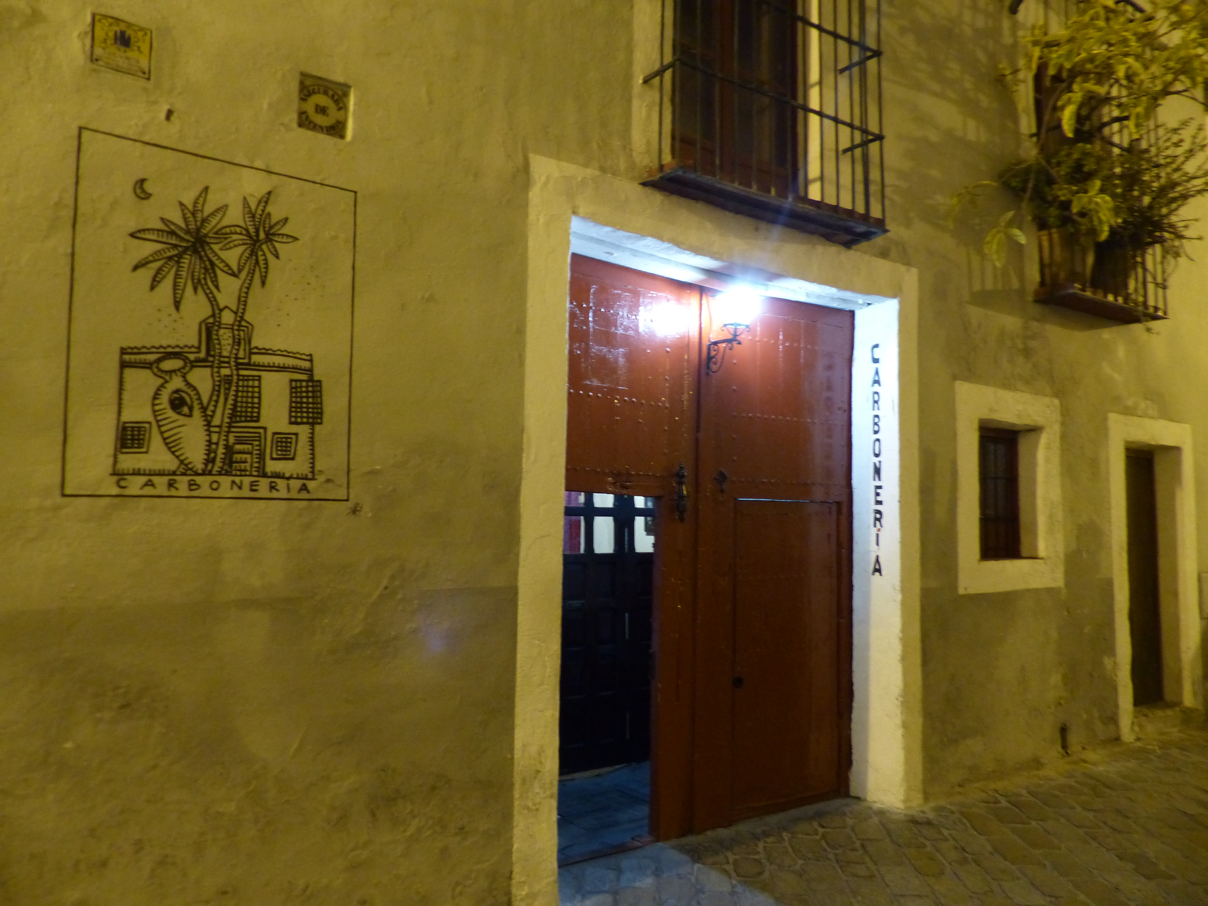 San Bartolomé, la Carbonería